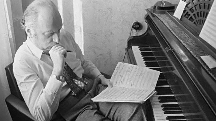 ملحن وموسيقى روسي